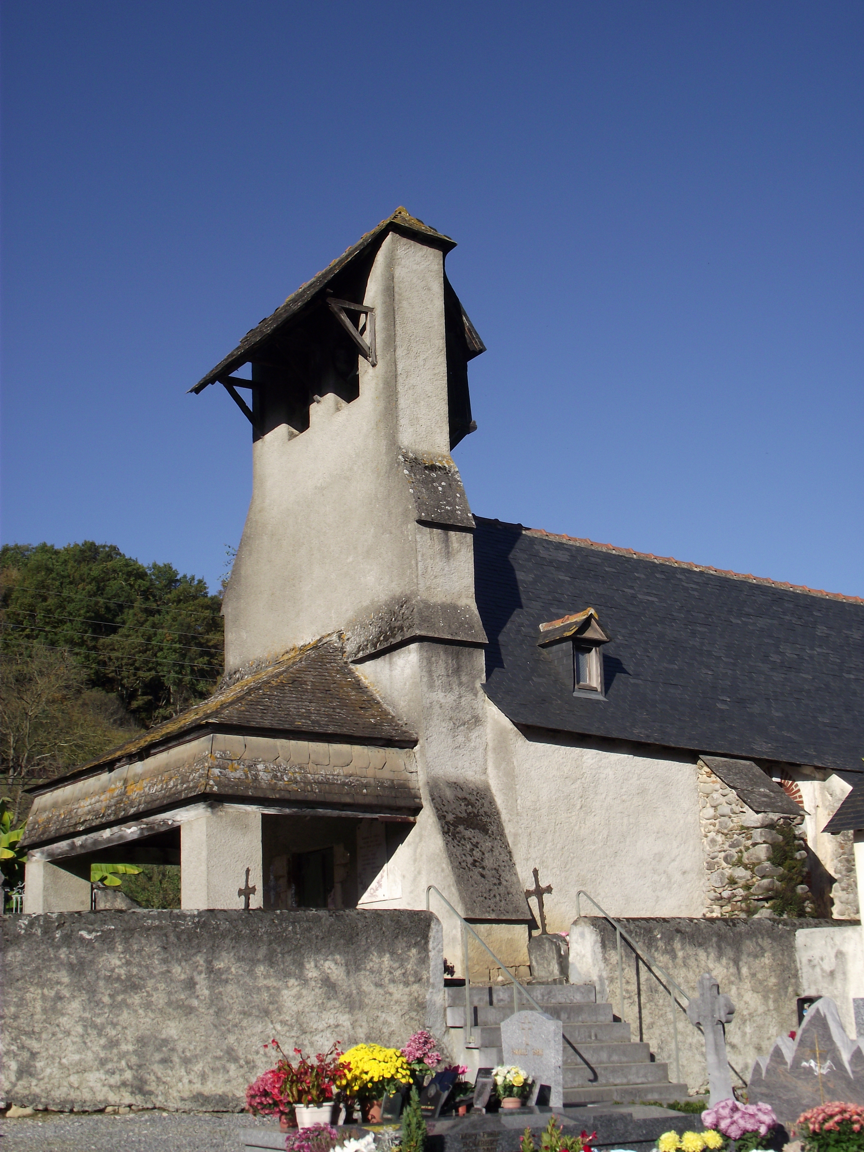 Église de l'Assomption de Paréac (Hautes-Pyrénées, France)